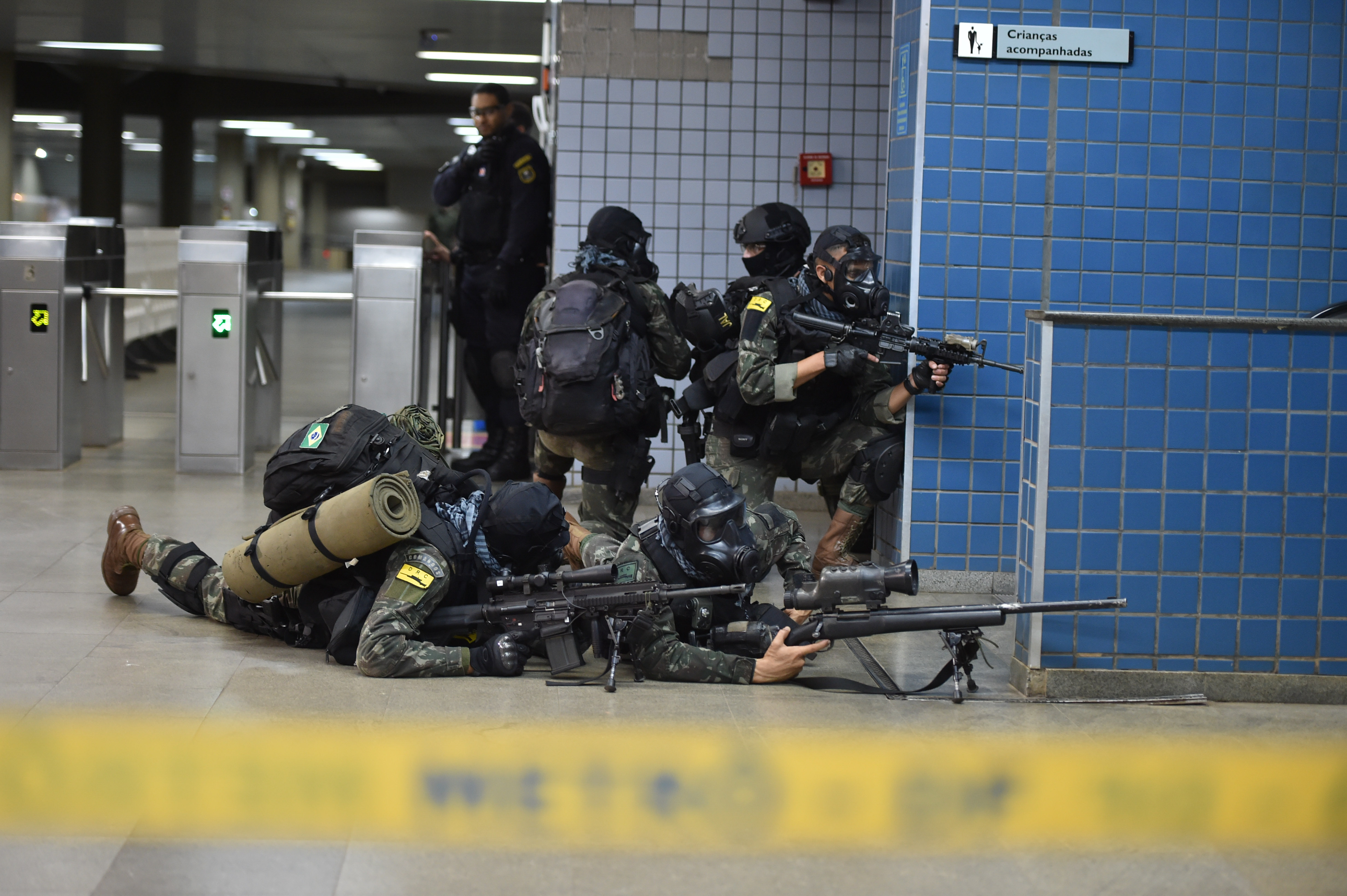 Estação Central do Metrô, Rodoviária do Plano Piloto, Brasília, DF, Brasil 29/7/2016 Foto: Andre Borges/Agência Brasília. O Comando Militar do Planalto executou, nesta quinta-feira (28), uma simulação para agir em caso de atentados durante a Olimpíada 2016 em Brasília. Por volta das 23 horas de ontem, figurantes que se passaram por terroristas anunciaram que estavam armados e que tinham reféns. Os agentes de segurança do metrô informam o Centro Integrado de Comando e Controle Regional, responsável por acionar os batalhões responsáveis,que tomaram a estação.